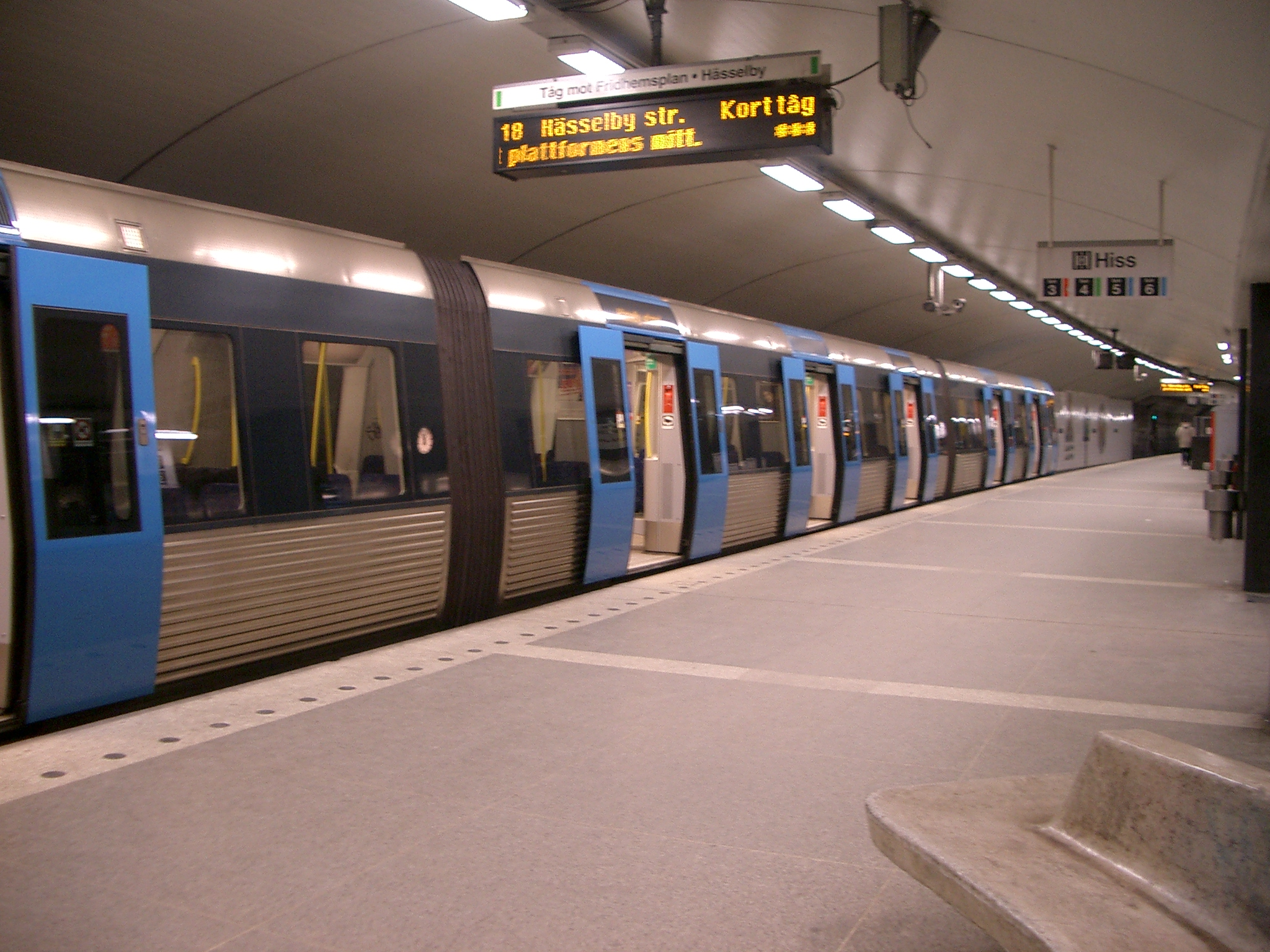 Stockholm Metro, Stockholm, Sweden